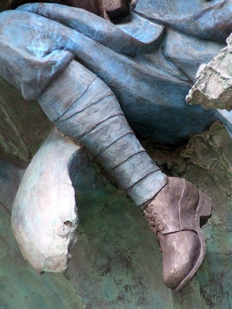 Pomnik Czynu Zbrojnego Polonii Amerykańskiej - detail owijacz